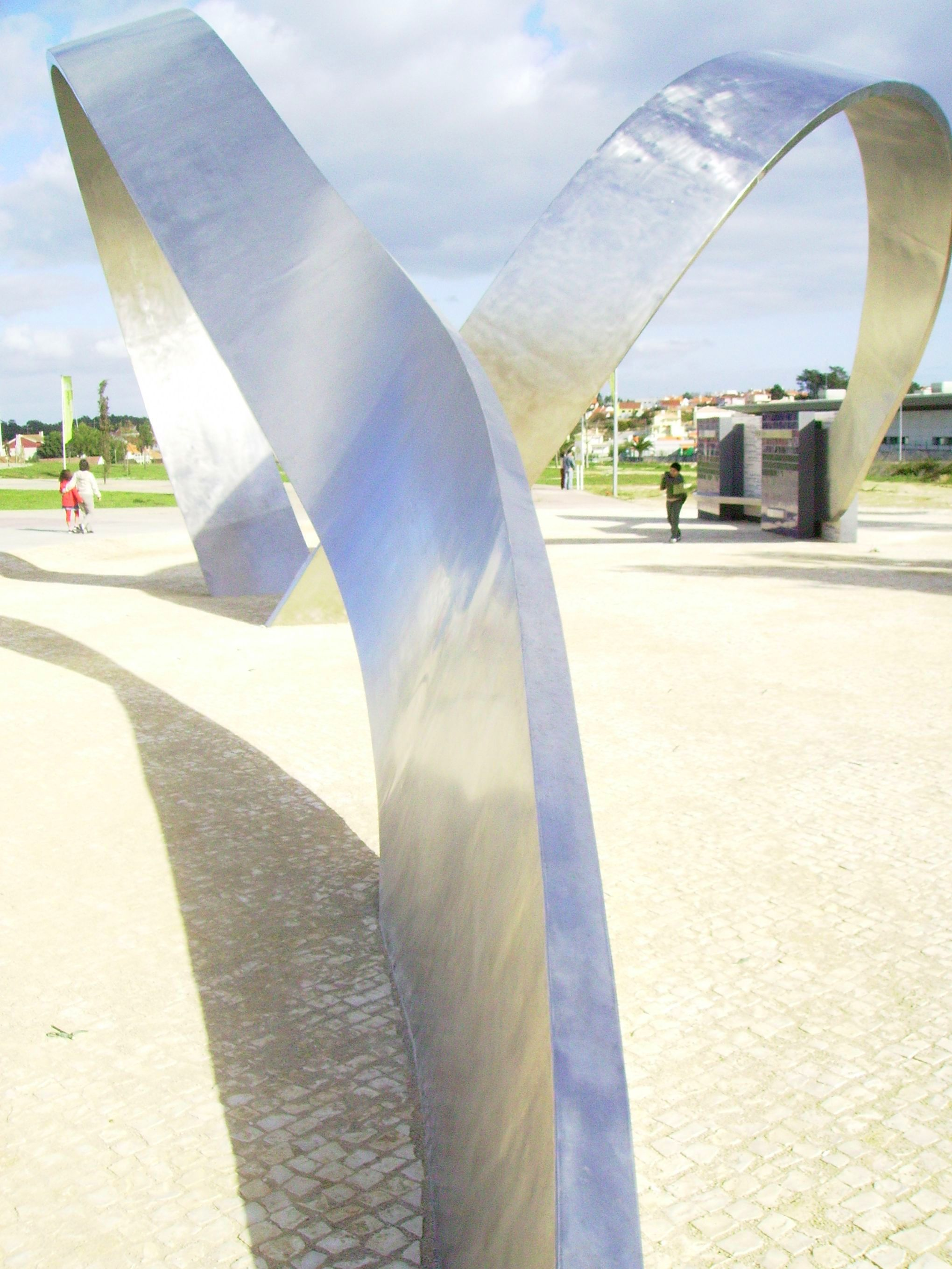 Autore: Massimo De Maria, Descrizione: Monumento alla Donna, Licenza: CC 2.0, Data: 09 marzo 2008